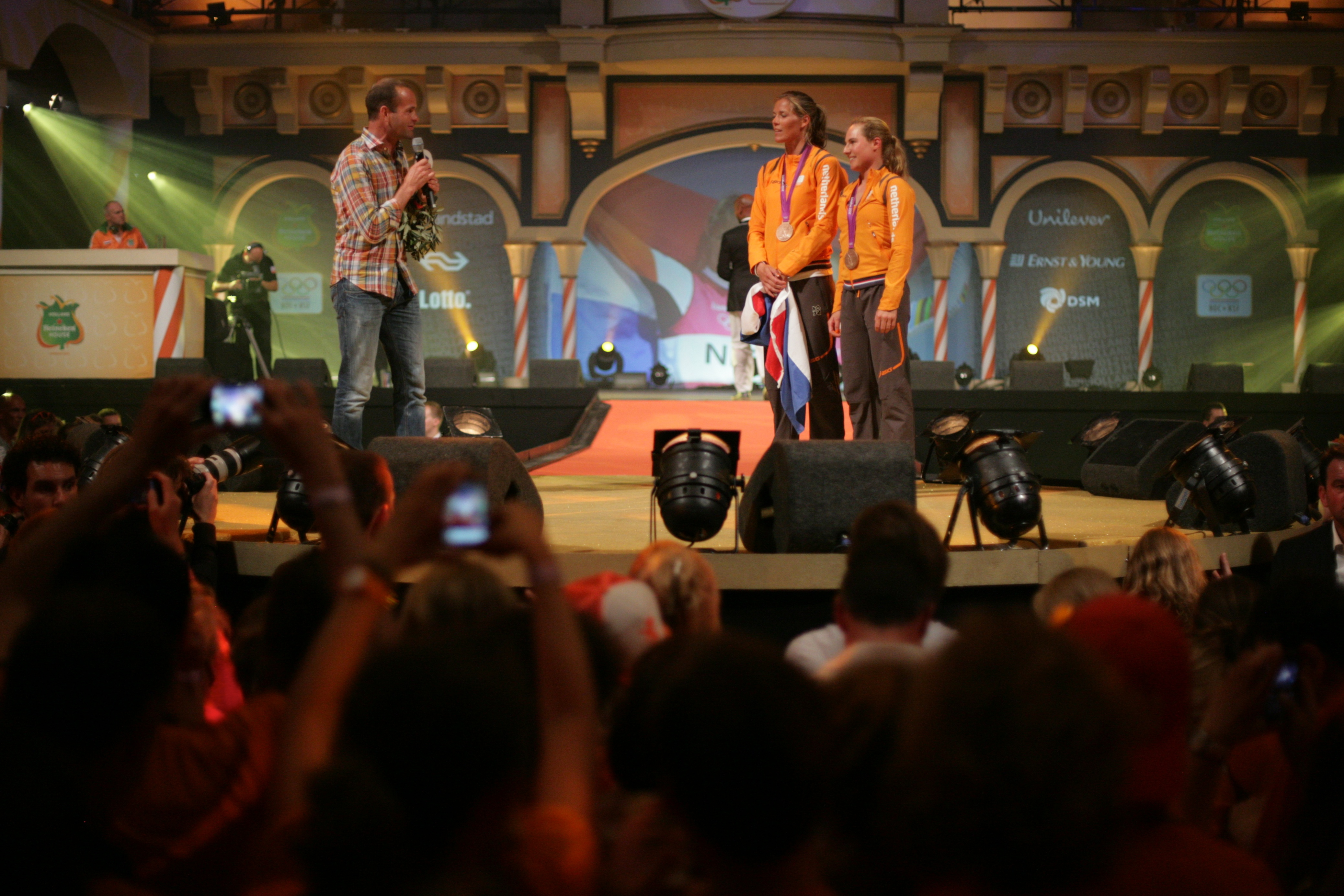 Lobke Berkhout & Lisa Westerhof @ Holland Heineken House